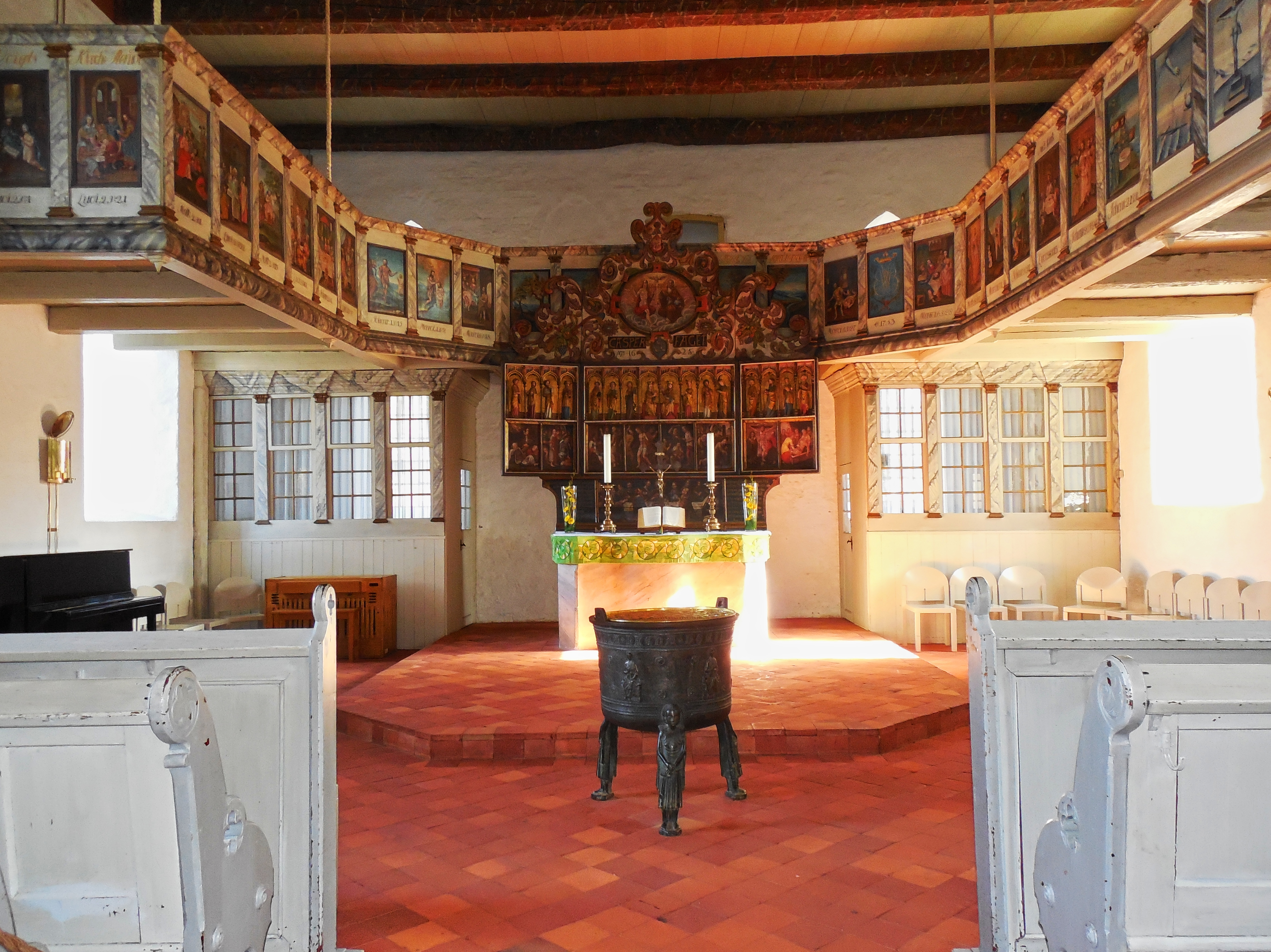 Altar